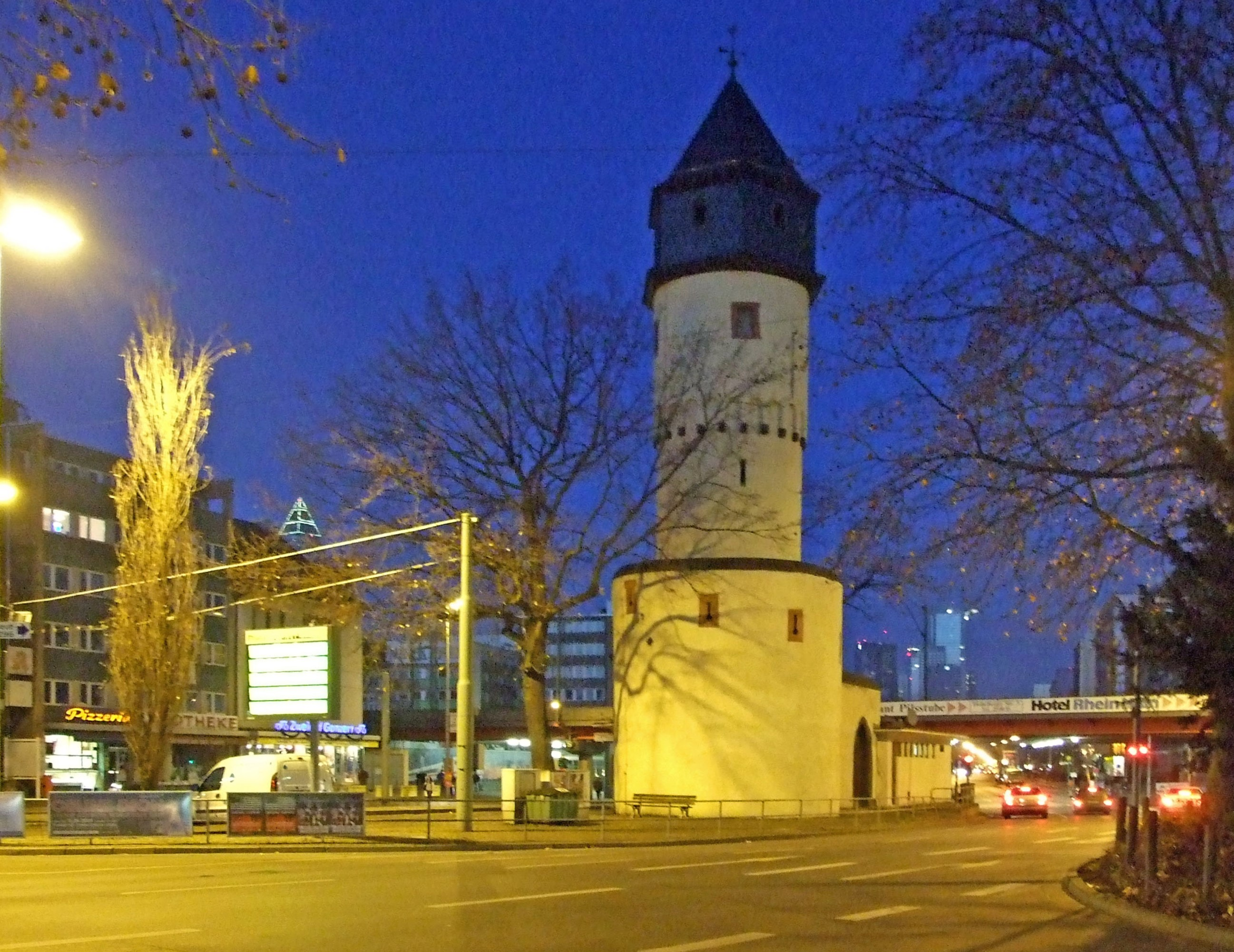 Galluswarte von der Kleyerstrasse in Richtung Mainzer Landstrasse - Richtung Hauptbahnhof/Platz der Republik